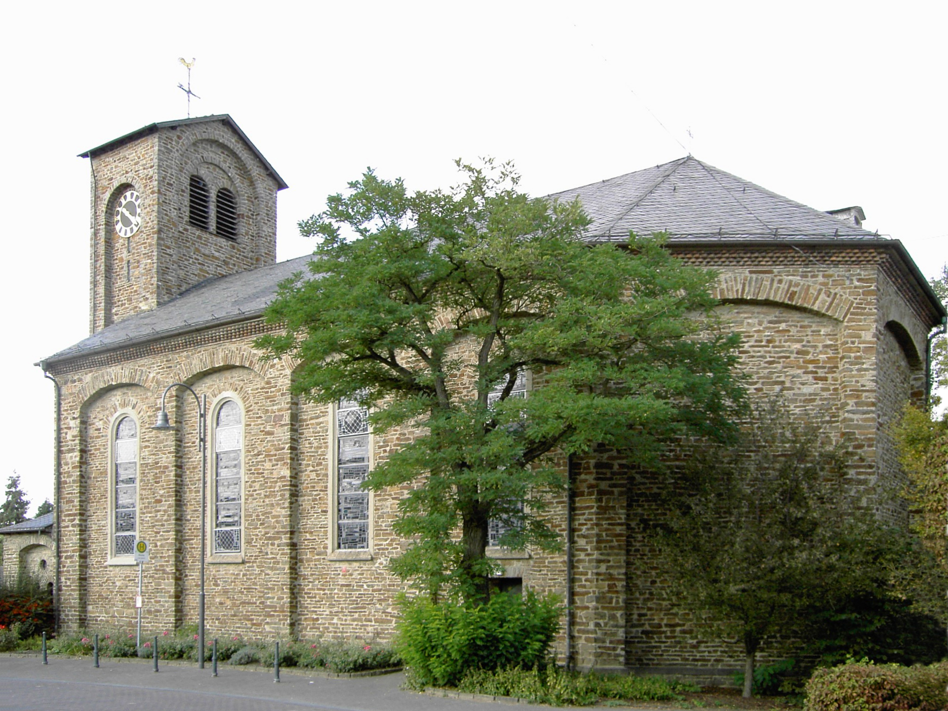 Kirche der Gemeinde Waldesch, architect: Johann Claudius von Lassaulx